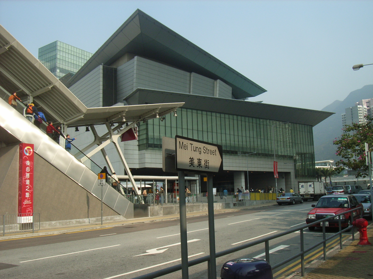 Ngong Ping 360, 昂坪360, 東涌站 (昂坪360), 美東街.